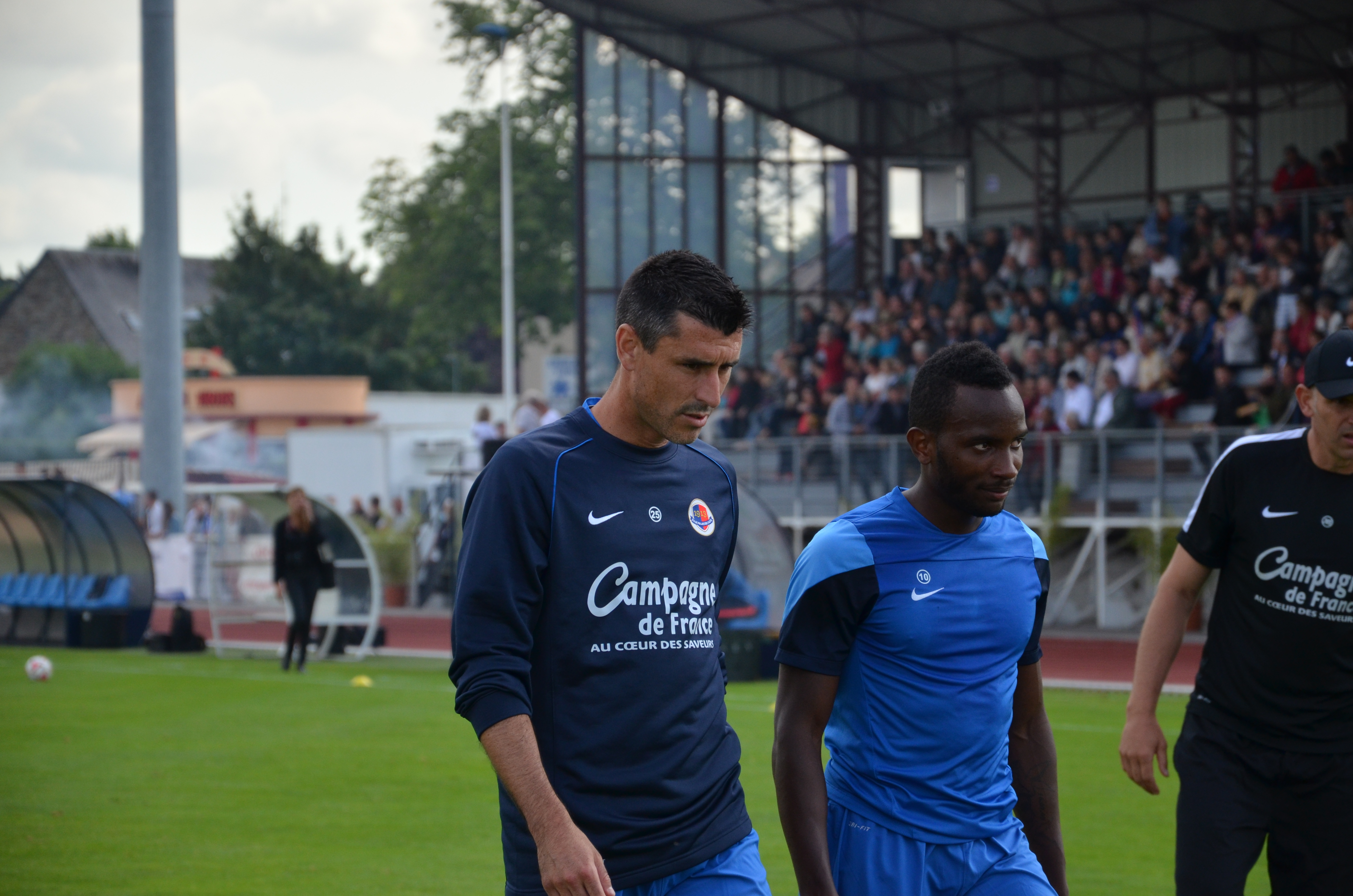 Photographie prise à l'occasion de la rencontre amicale opposant le Stade Malherbe de Caen au Stade rennais, le 9 juillet 2014 au stade Pierre-Comte de Vire. Ici, Julien Féret et Lenny Nangis.